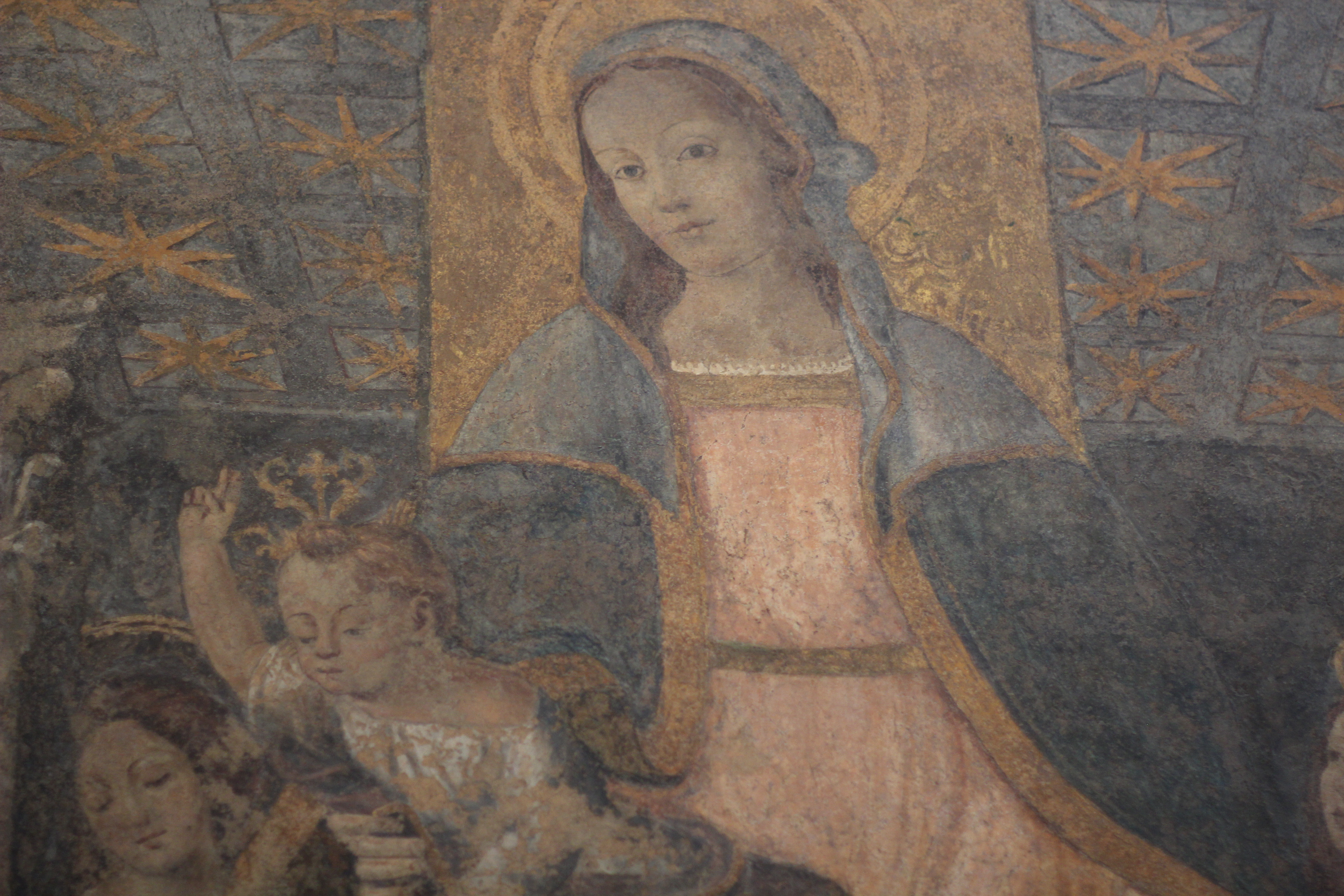 Madonna del Baldacchino: attribuito a Gandolfino di Roreto (Asti, dopo 1470 – dopo 1520). Affresco strappato, fine del quattrocento/inizio cinquecento, cm 170 x 210. Provenienza: Cattedrale di Asti, fronte sud della sacrestia. Restauro 2006: Nicola restauri, Aramengo (AT). Direzione lavori: Rossana Vitello, Sopraintendenza per i beni storici, artistici ed etnoantropologici del piemonte